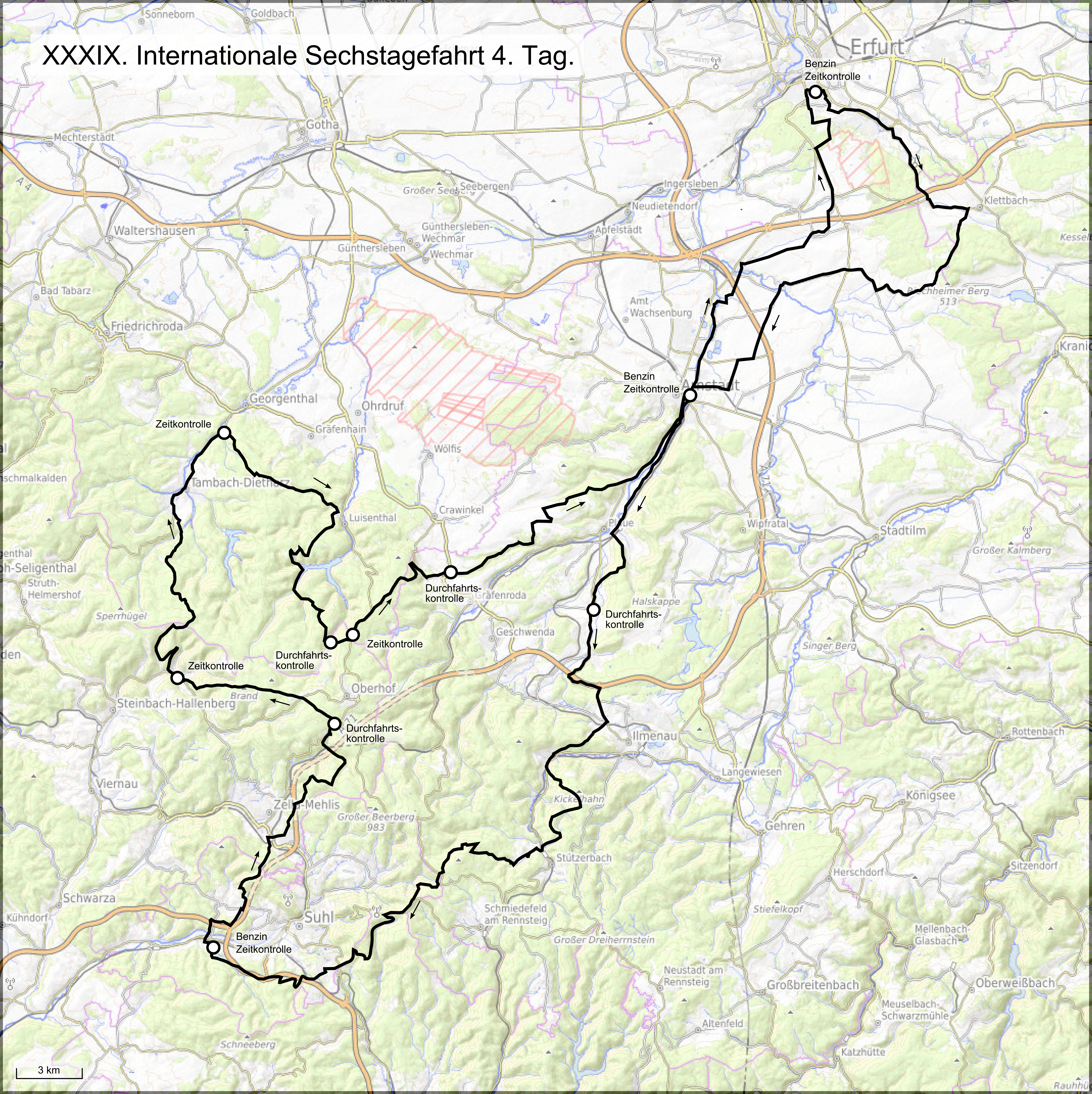 Karte der 39. Internationale Sechstagefahrt, Route des 4. Tages